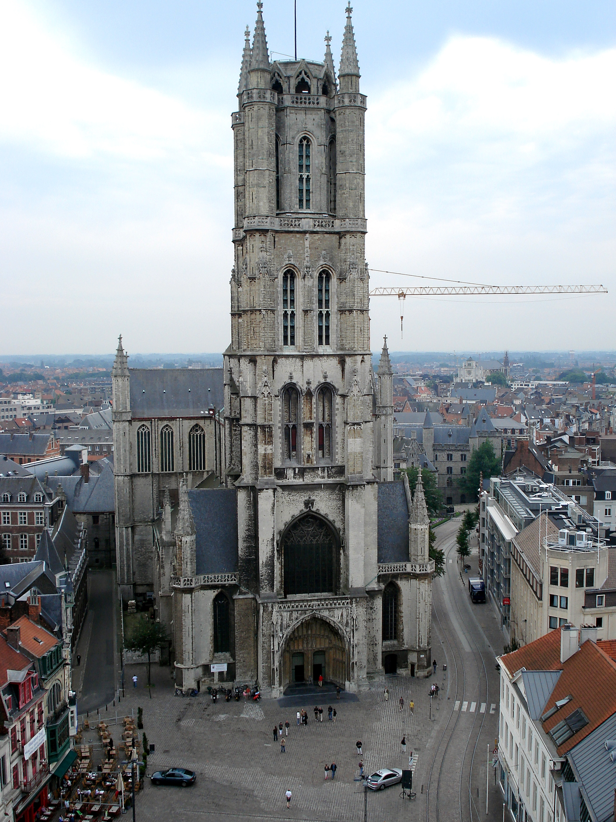 Nederlands. Sint-Baafskathedraal te Gent, vanuit Belfort. Rechts op achtergrond Geraard de Duivelsteen (vleugel uit 19de eeuw). Verderop rechts, gevel van Sint-Annakerk (met roosvenster). Français. Gand, Belgique: cathédrale Saint-Bavon. Derrière la cathédrale, à droite: Geraard de Duivelsteen (chât. de Gérard le Diable), dont la partie visible ici est une aile ajoutée au XIXe siècle. Au loin, un peu en dessous de la ligne d'horizon, la façade «éclectique» (avec la rosace) de l'église Sainte-Anne.